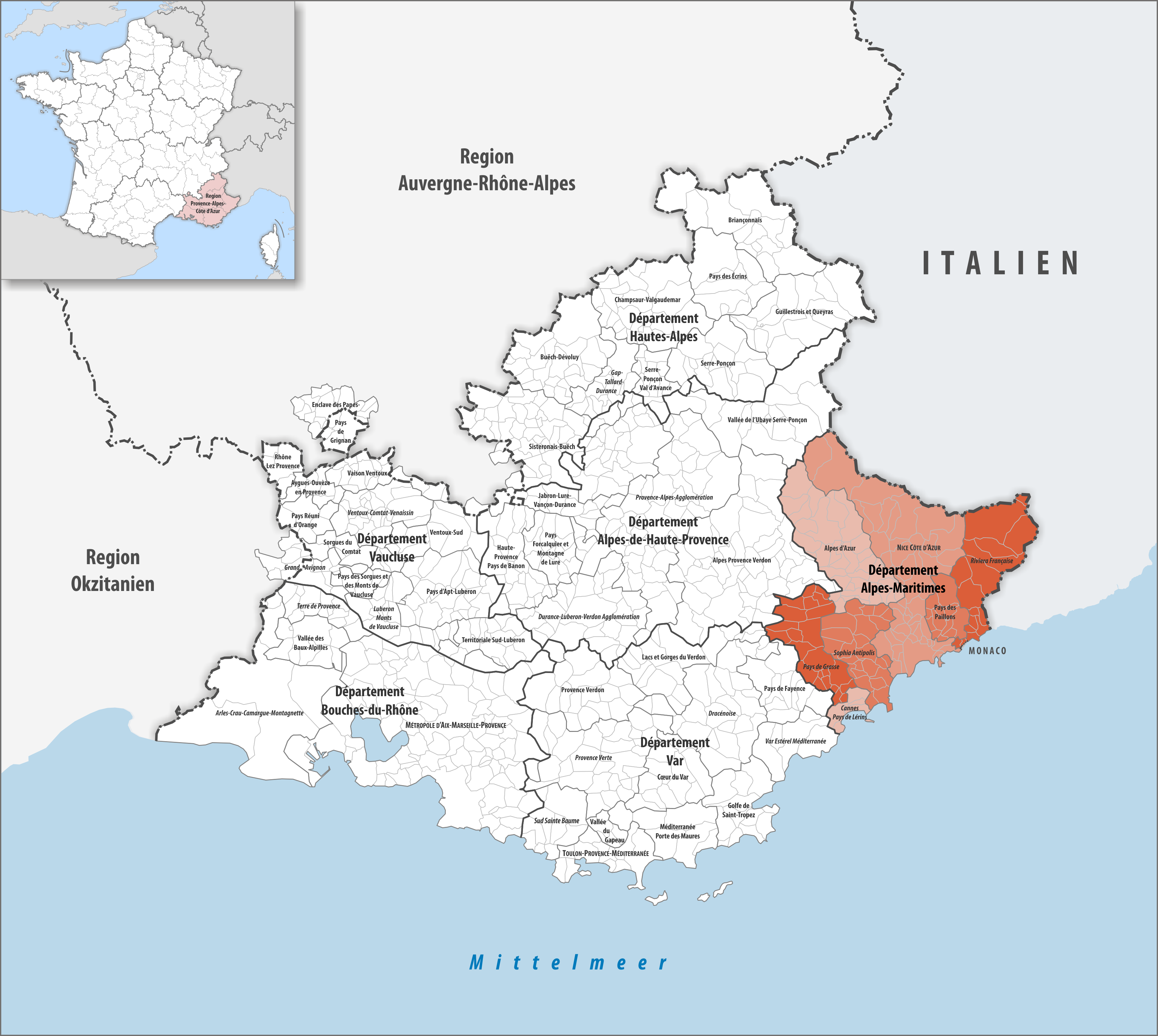 Gemeindeverbände im Département Alpes-Maritimes